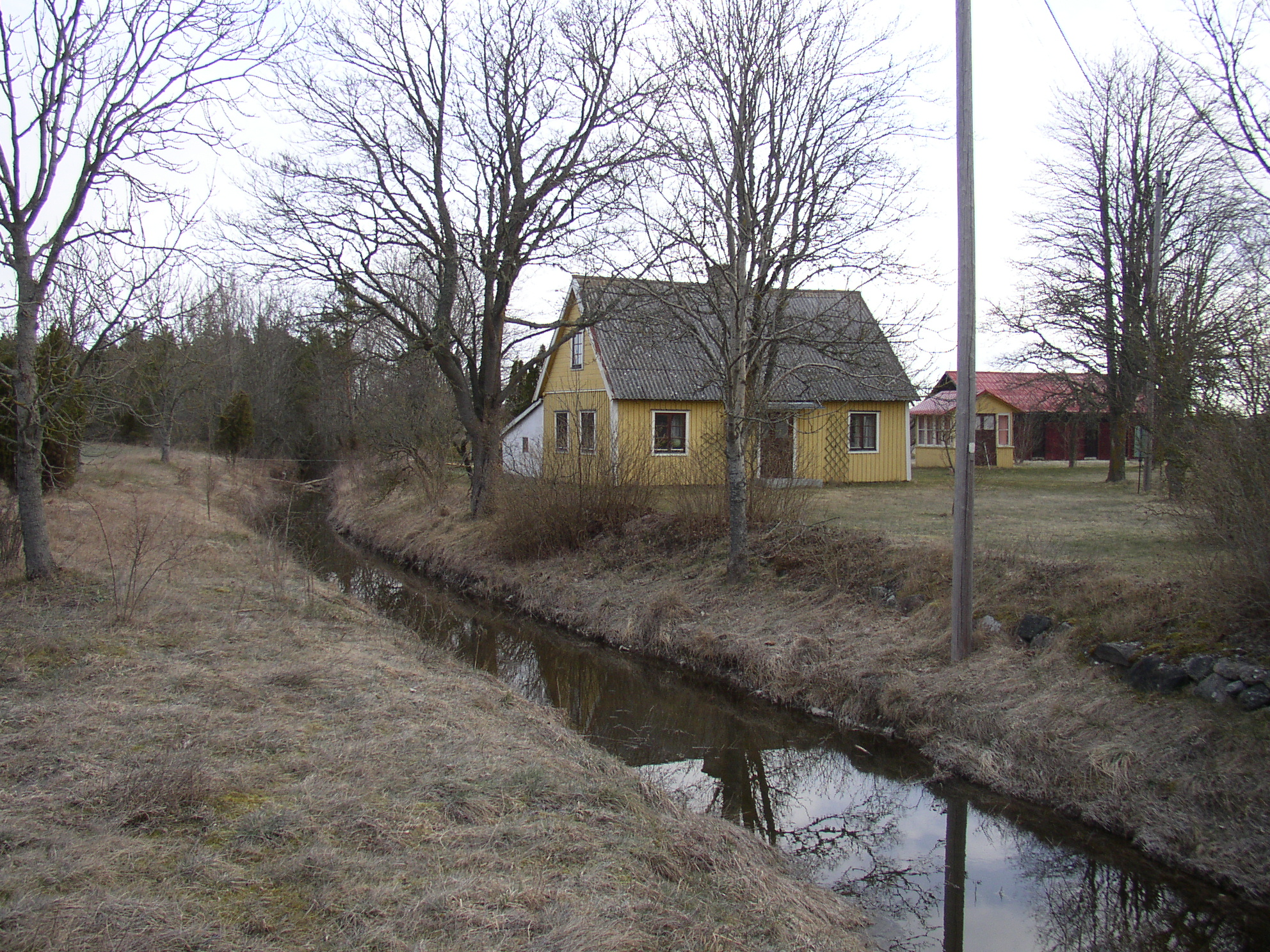 De Aner Å, rivier in Zweden.